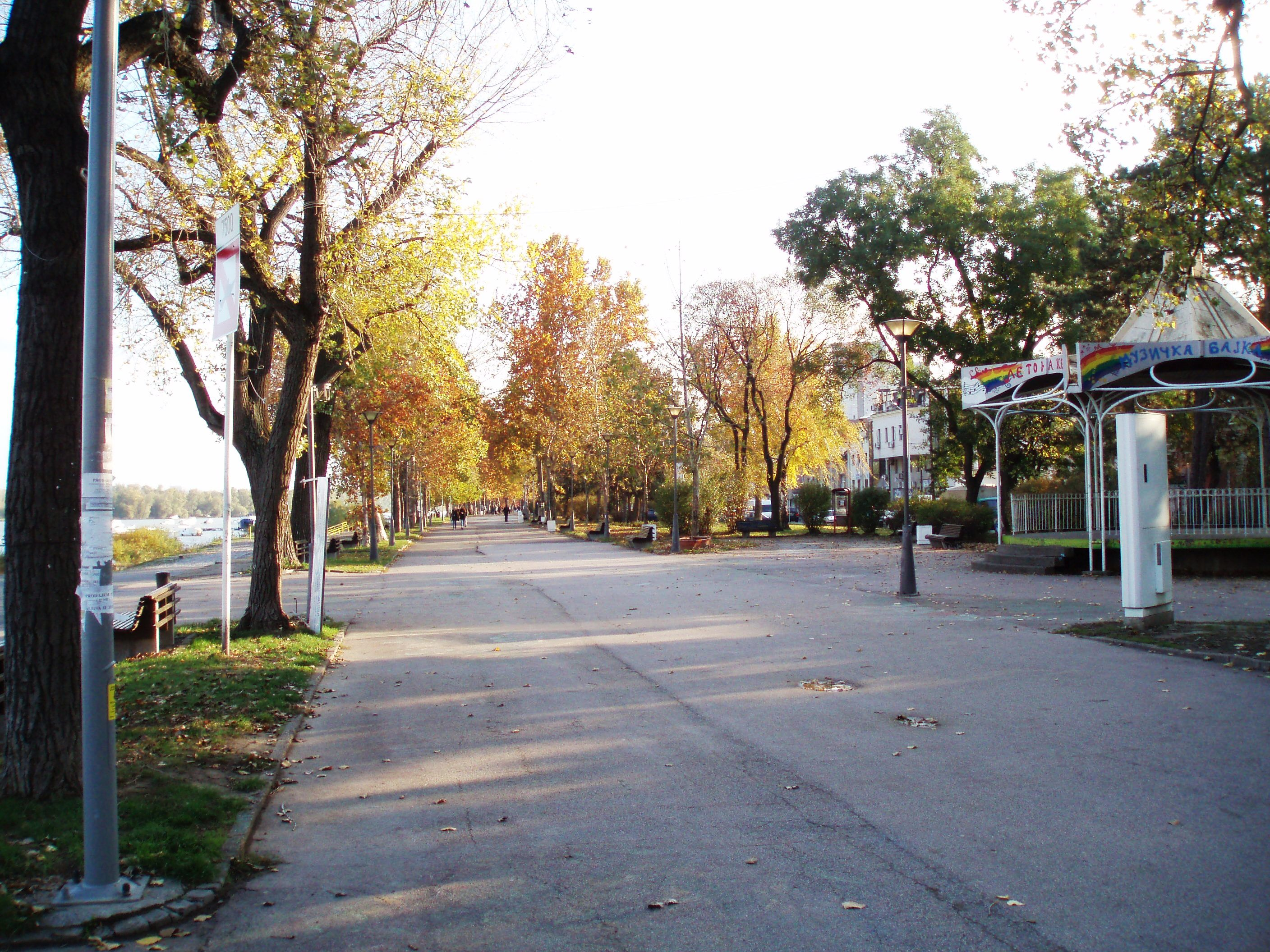 Zemunski kej - jesenji izgled šetališta, autor fotografije: Nicolo